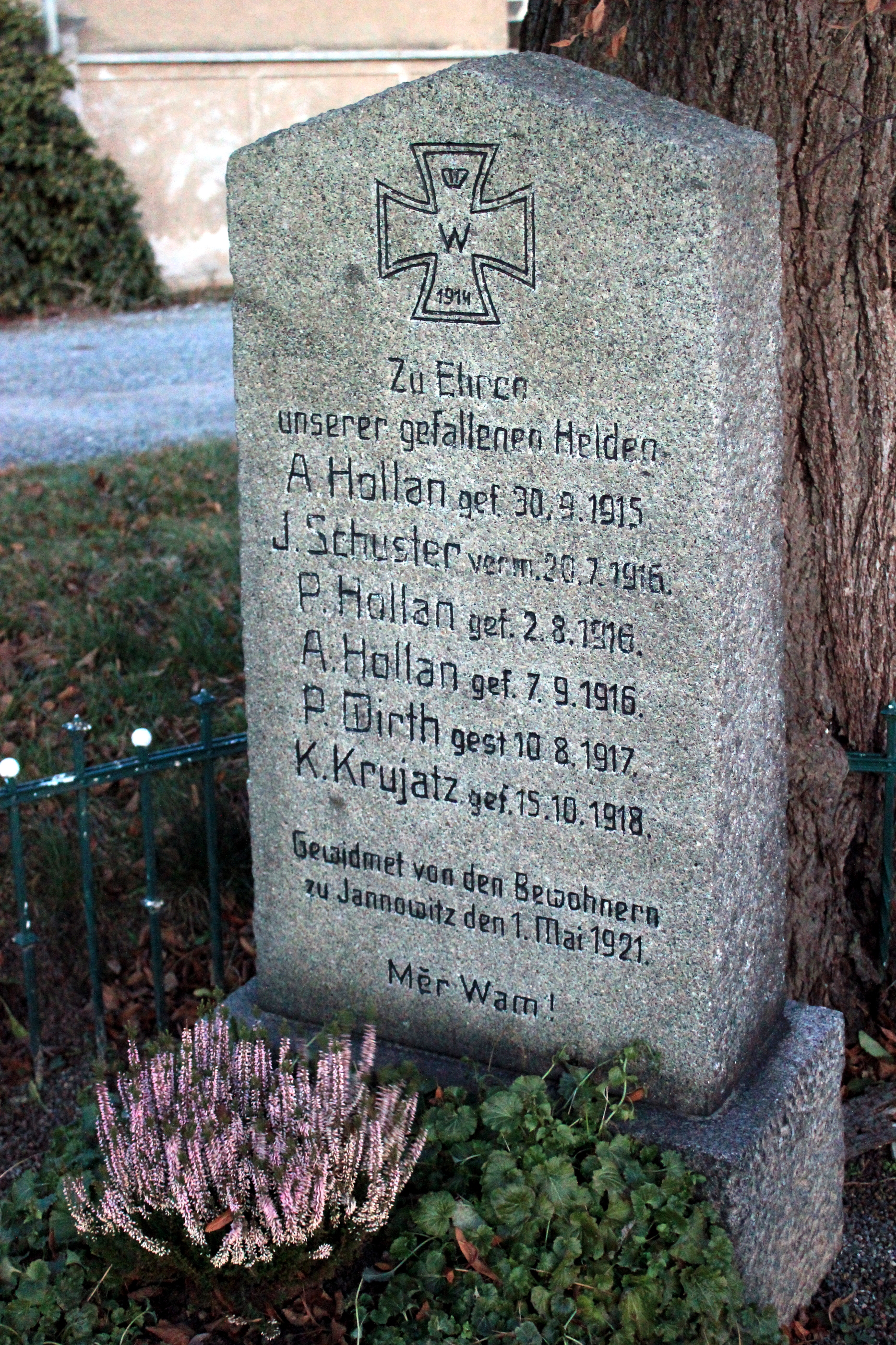 Hornjoserbsce: Wojerski pomnik w Janecach.